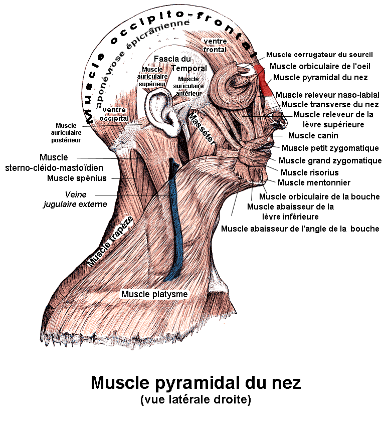 Muscle pyramidal du nez. Anatomie humaine